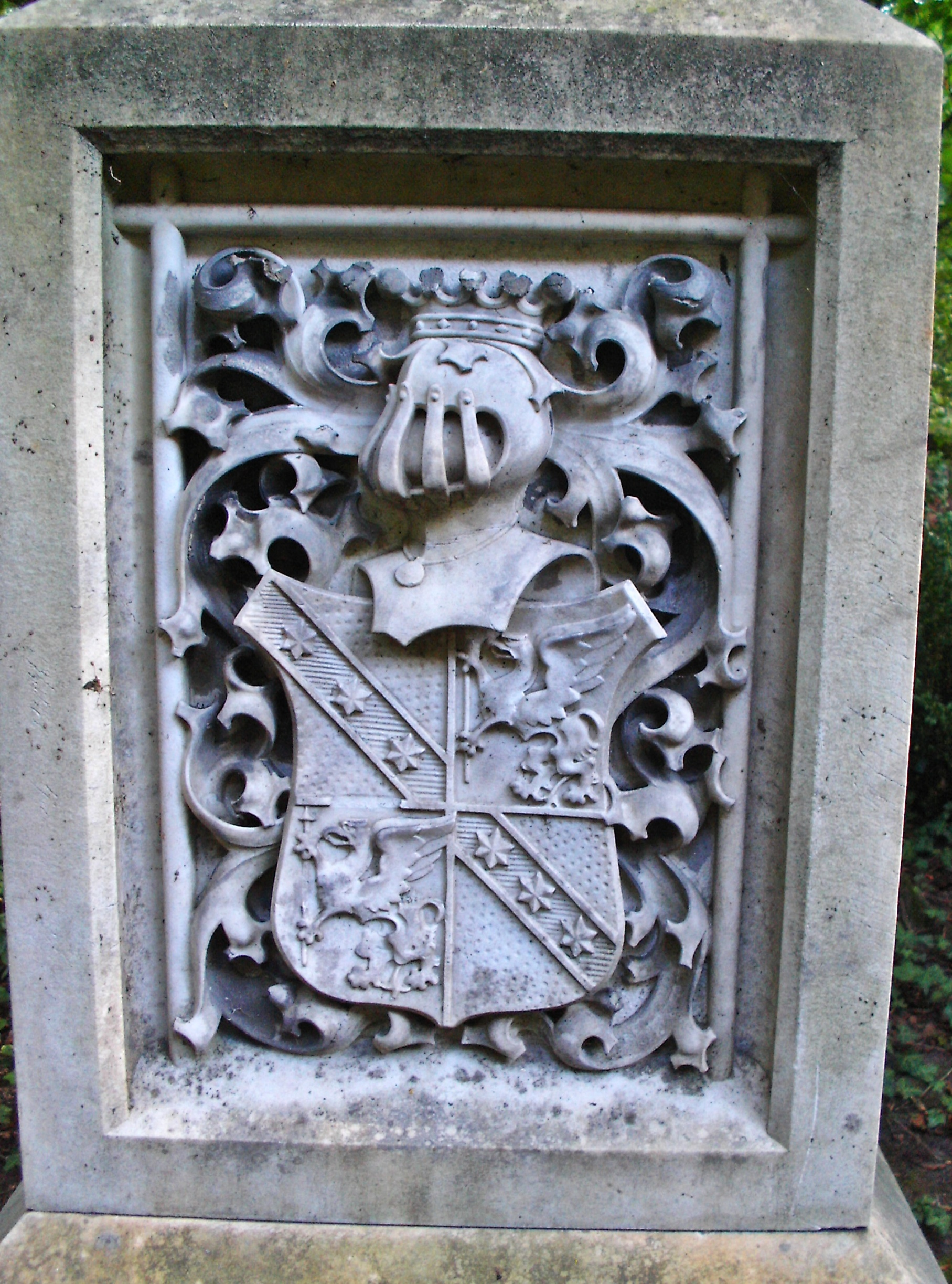 Wappen der Familie "von Stichaner", vom Grab Philiberts von Stichaner (1841-1863), Sohn des Regierungspräsidenten Joseph von Stichaner, Alter Friedhof Speyer